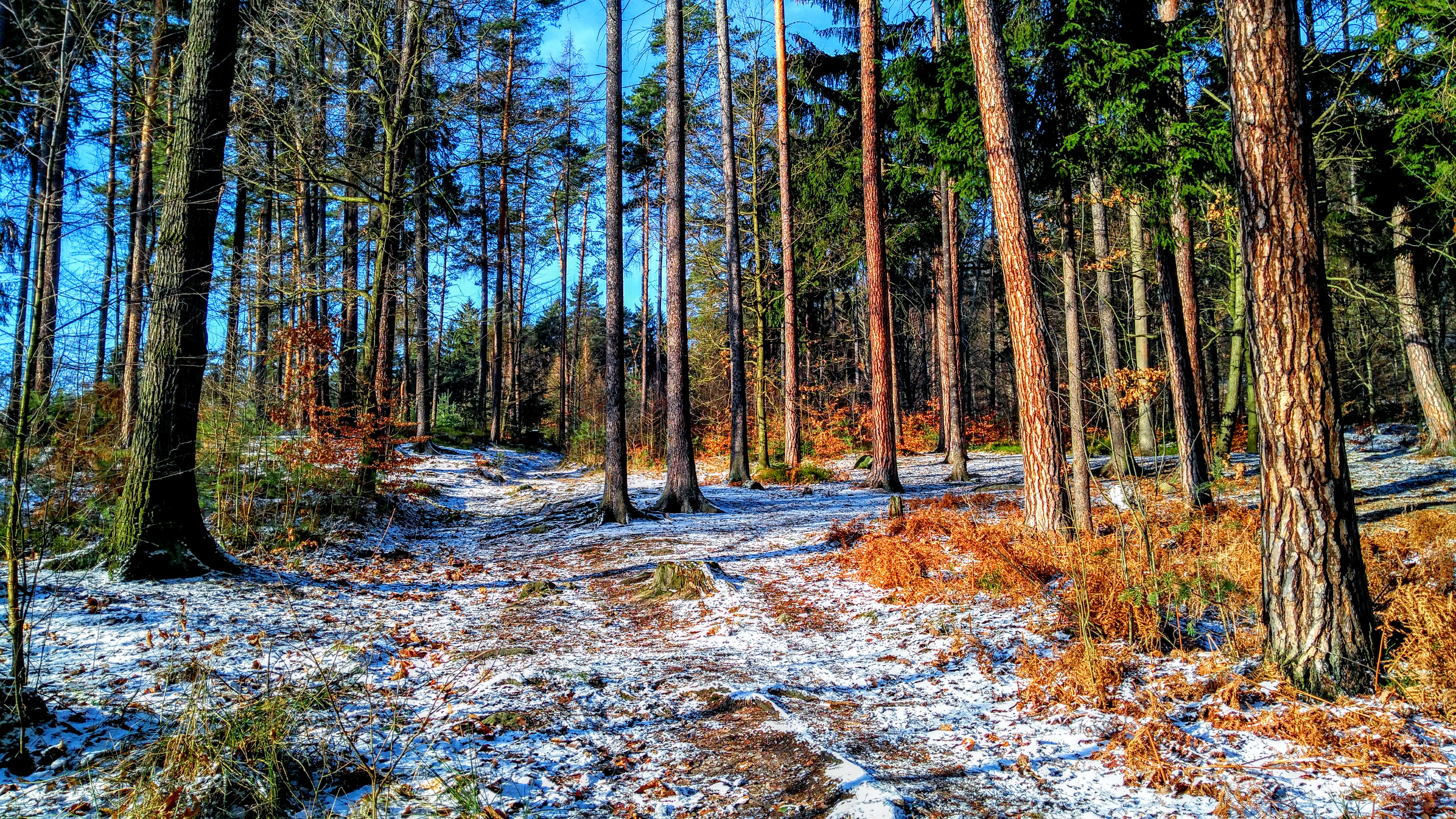 Forrest - Les